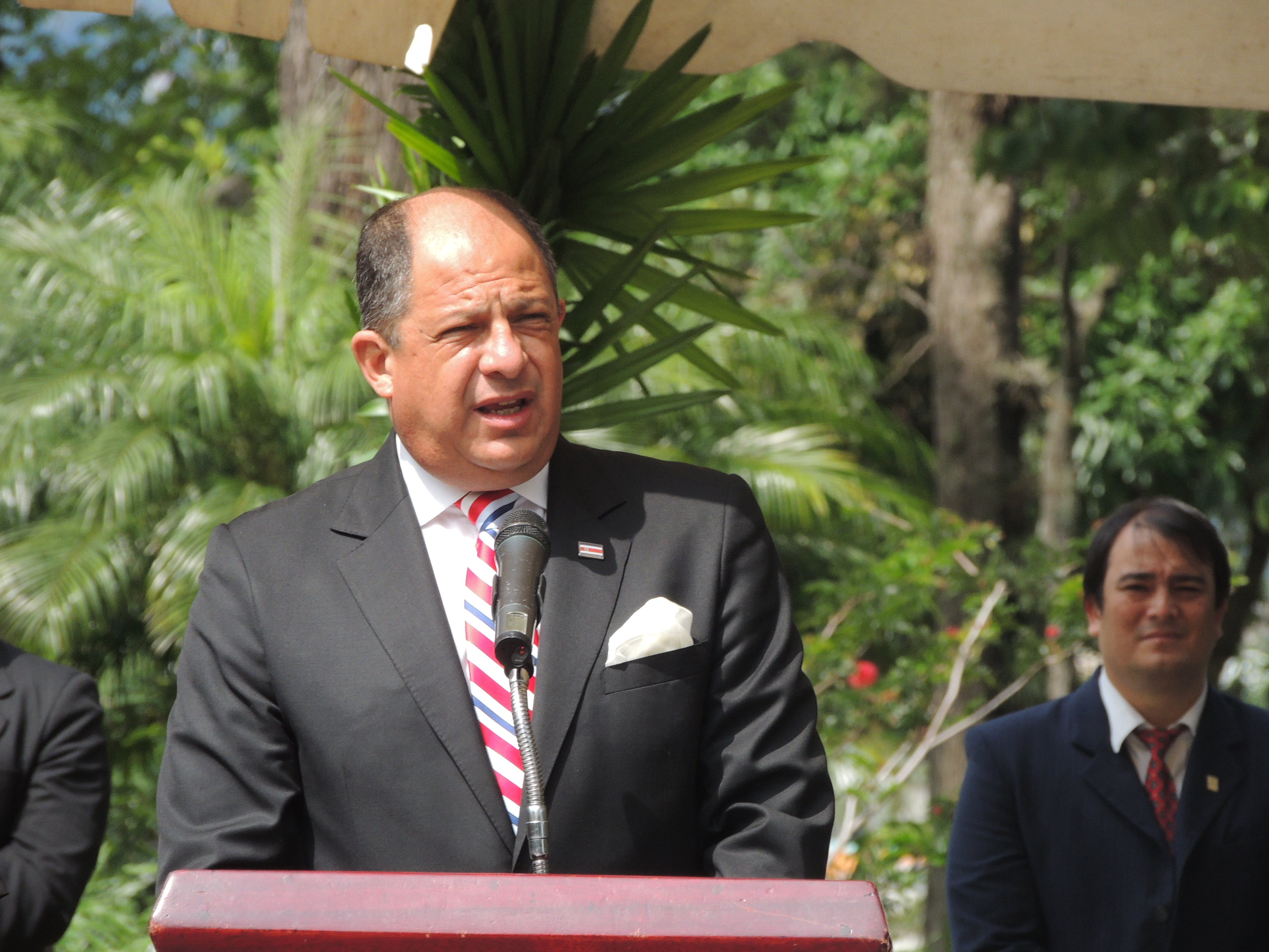 Luis Guillermo Solís, Presidente de Costa Rica